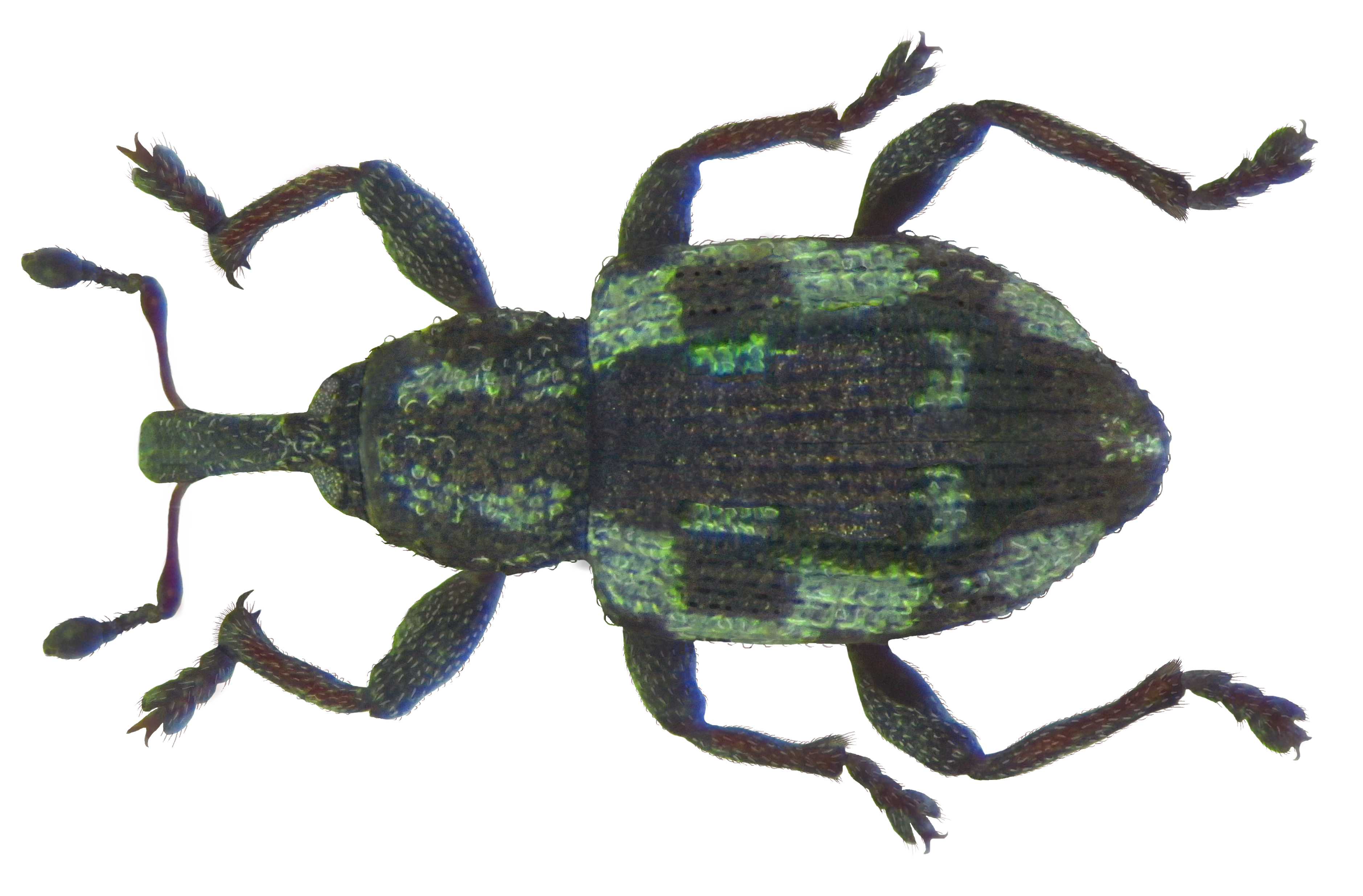 Familie: Curculionidae Groesse: 1,8 mm (1,4-1,8 mm) Verbreitung: Palaearktisch Oekologie: Entwicklung in Lemna (Wasserlinse) Fundort: Germania, Bayern, Oberfranken, Selbitz, Dörnthal leg.det. U.Schmidt, 9.VII.2005 Photo: U.Schmidt, 2012